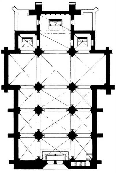 Plan de la collégiale Notre-Dame de Montréal (Yonne)